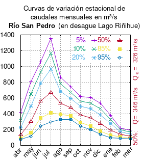 Curvas de variación estacional del río San Pedro en Desagüe del Lago Riñihue. # Dirección General de Aguas # Diagnóstico y clasificación de los cursos y cuerpos de agua según objetivos de calidad. Cuenca del río Valdivia. # Santiago de Chile # Ministerio de Obras Públicas (Chile) # 2004 # url: # urlarchivo: # Tabla 4.4: Río San Pedro en desague Lago Riñihue (m3/s), pág.47 mes 5% 10% 20% 50% 85% 95% abr 419.95 315.86 228.96 135.85 87.41 74.51 may 805.12 648.67 499.31 302.79 163.52 113.87 jun 1059.35 928.63 787.12 560.75 346.16 246.29 jul 1356.18 1167.39 970.21 671.99 411.86 299.58 ago 866.83 778.72 683.92 533.52 392.94 328.37 sep 744.86 671.54 595.11 479.67 377.12 330.59 oct 621.20 560.42 494.70 389.77 290.59 244.56 nov 603.59 534.89 462.07 349.32 247.51 202.17 dic 538.23 464.65 388.87 276.70 181.96 142.25 ene 380.60 328.29 274.45 194.89 127.84 99.80 feb 219.69 199.15 176.82 140.88 106.48 90.34 mar 191.16 167.09 143.96 113.18 91.00 82.97 This plot was created with Gnuplot.